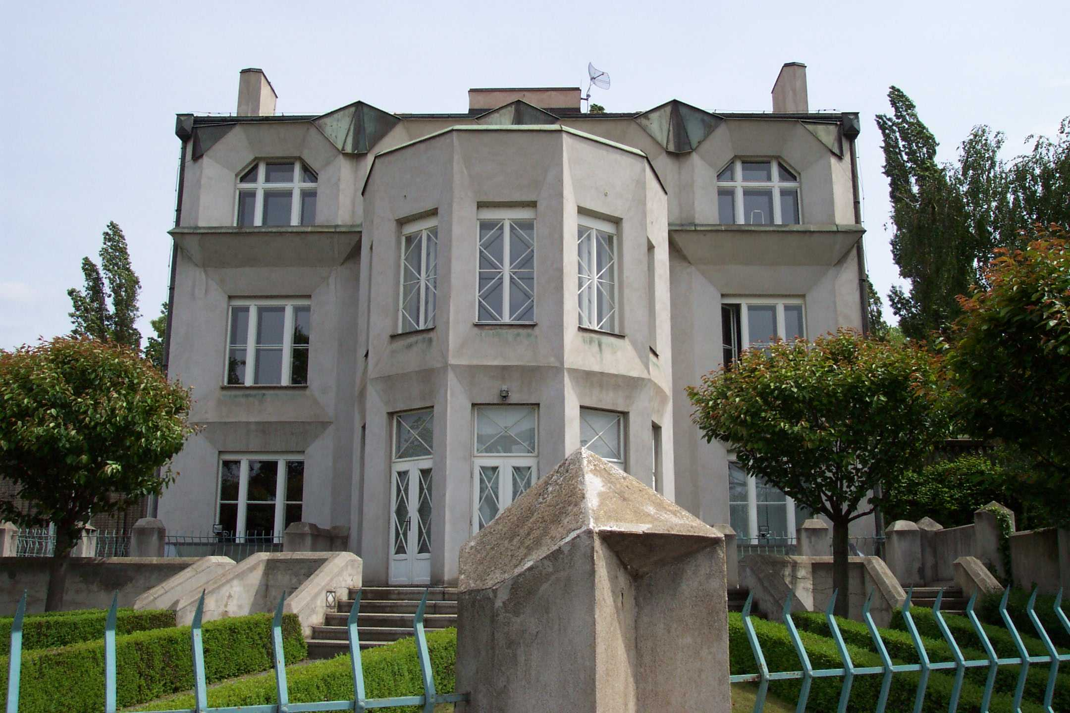 Cubistic villa at Prague-Výtoň - Kubistická vila v Praze na Výtoni